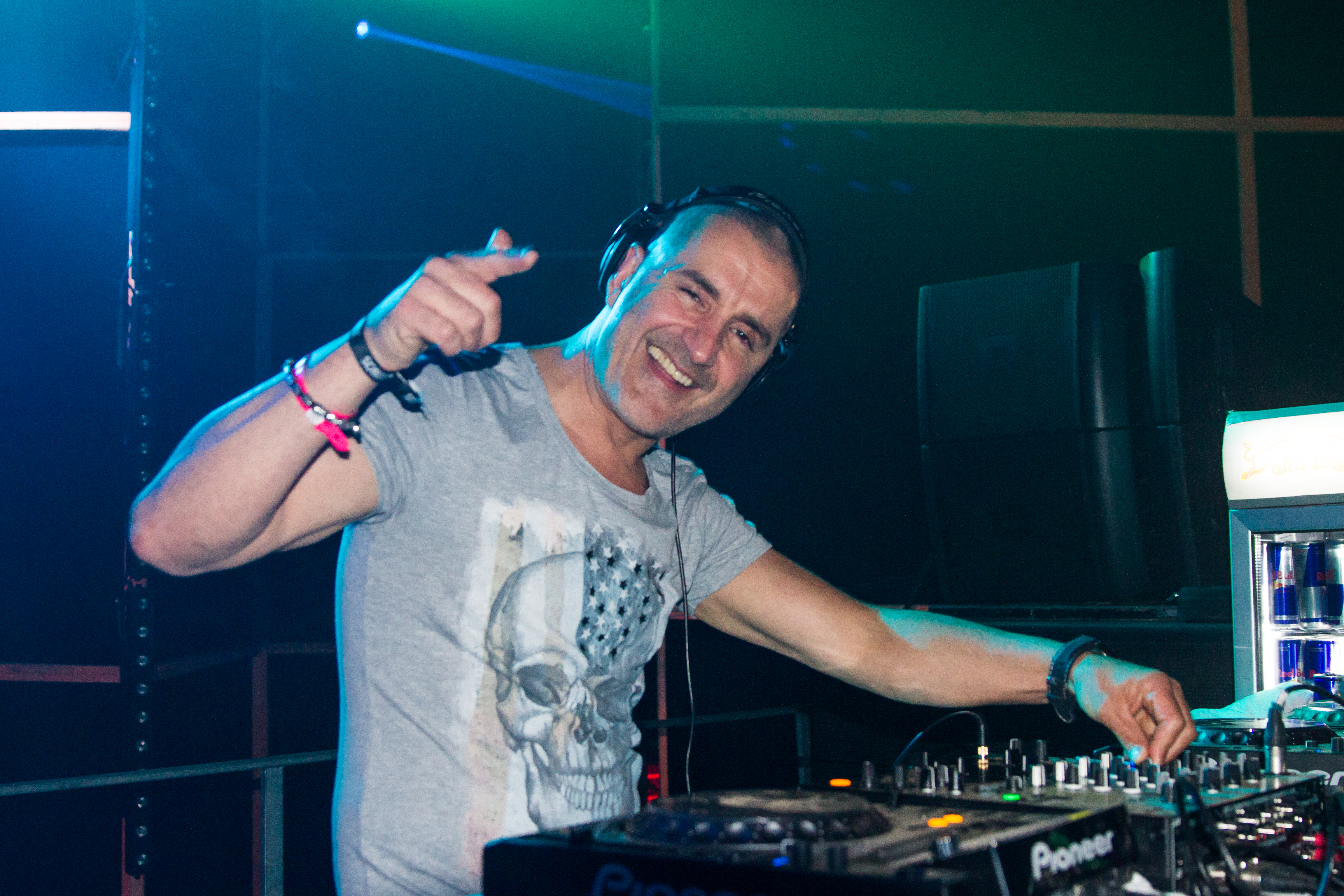 The Prophet (Dov J. Elkabas) beim 14. Airbeat-One Dance Festivals das vom 16. bis 19. Juli 2015 auf dem Flugplatz Neustadt-Glewe stattfand.